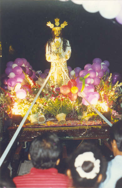 Imagen del patrón religioso de Monsefú.